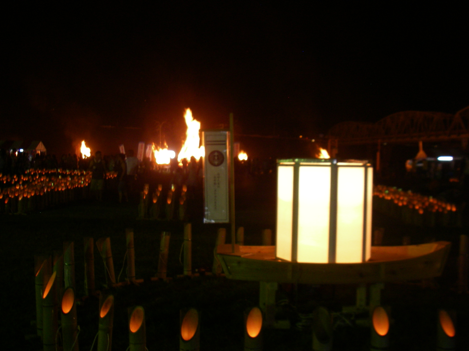 南部の火祭り 船灯籠